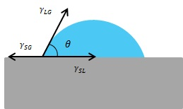 Youngの式